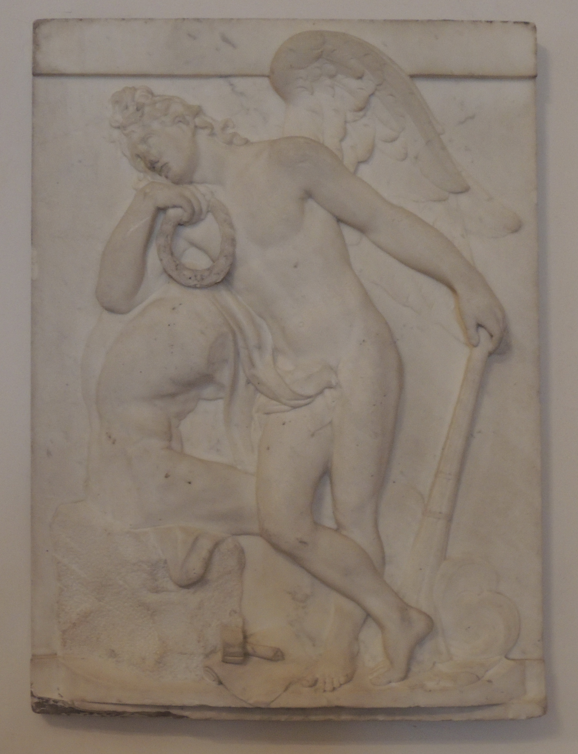 Благовещенская церковь Александро-Невской лавры. Козловский, Михаил Иванович. Рельеф, 1803. Скульптор В.И. Демут-Малиновский. Надгробие остается на Лазаревском кладбище